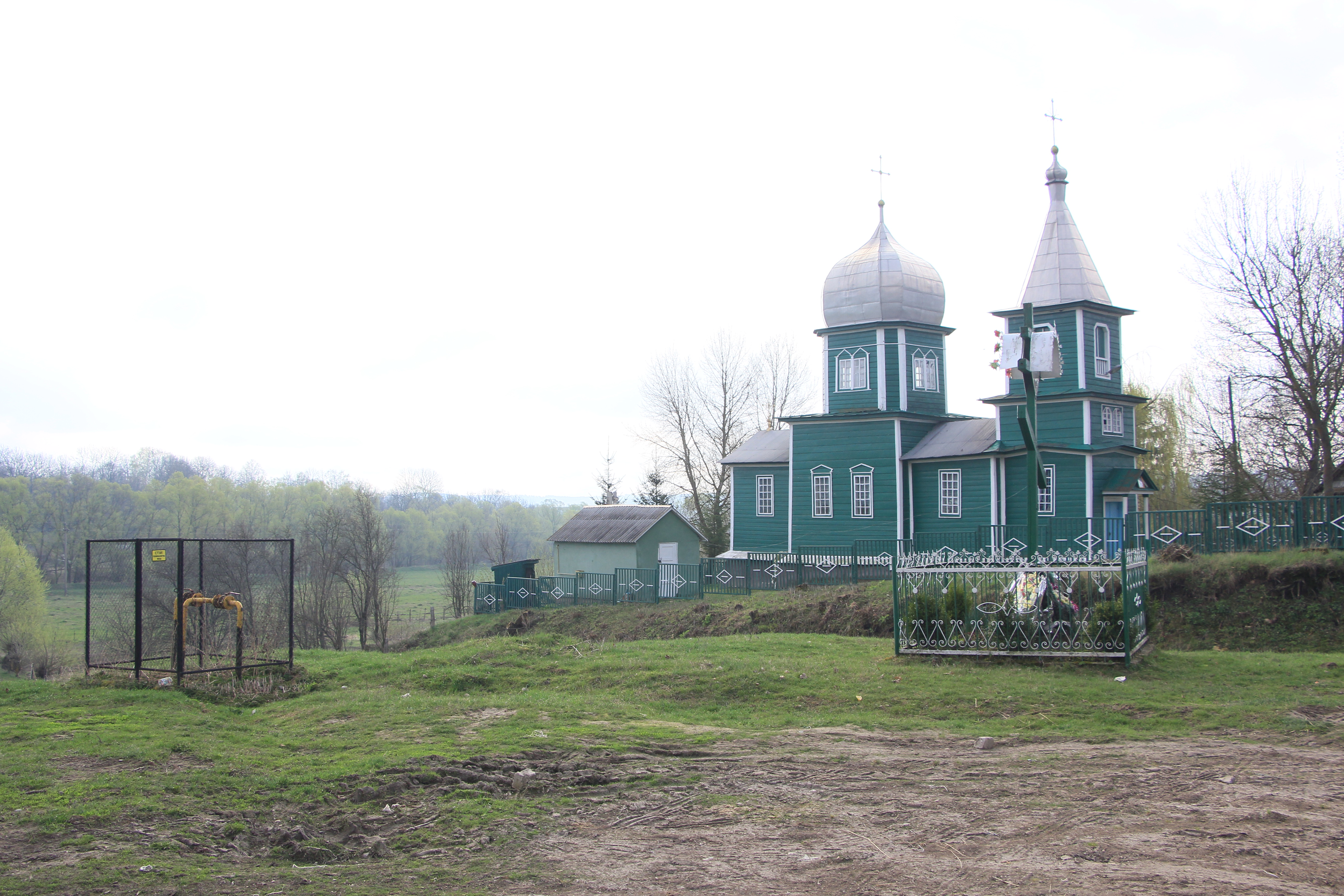 Дерев'яна церква в селі Борщівка Кременецького району, Тернопільської області